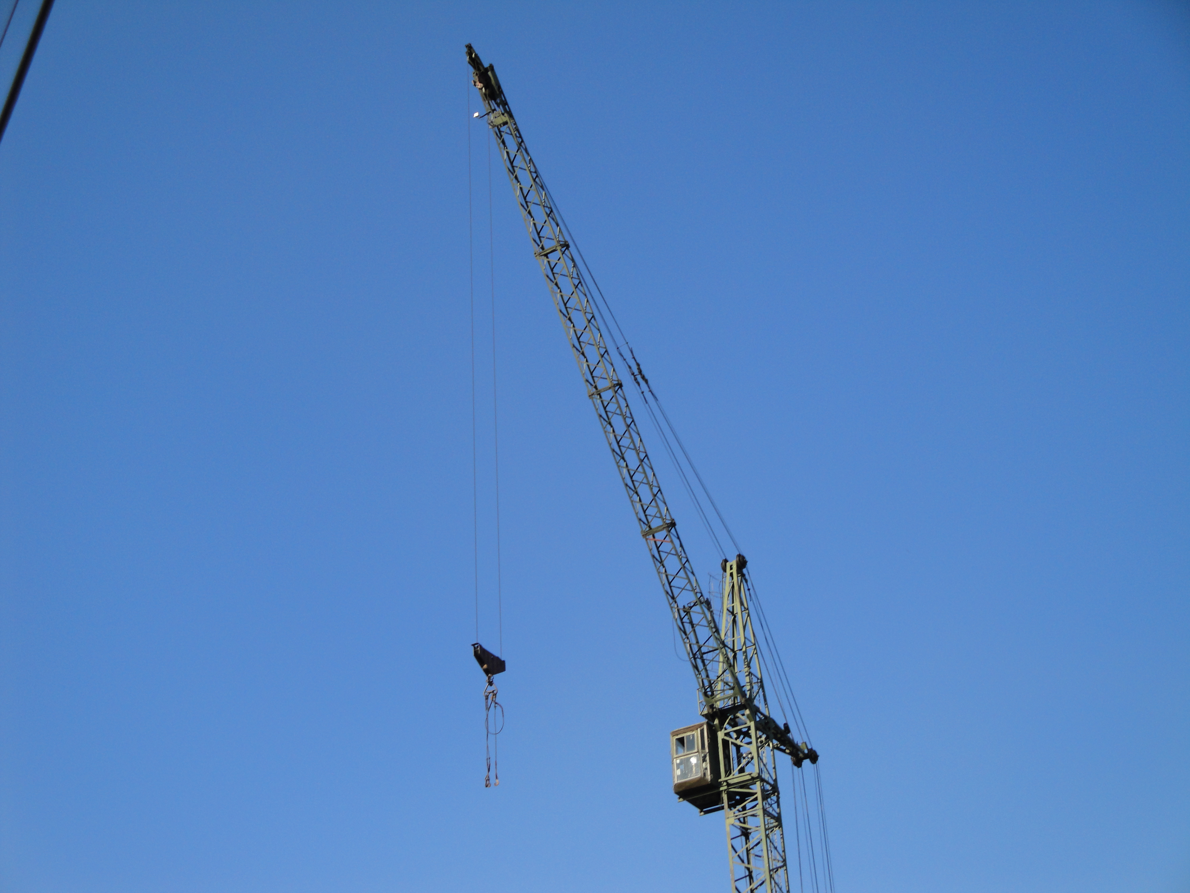 Kb308 (s981a) - верхняя часть конструкции крана - Новосибирск